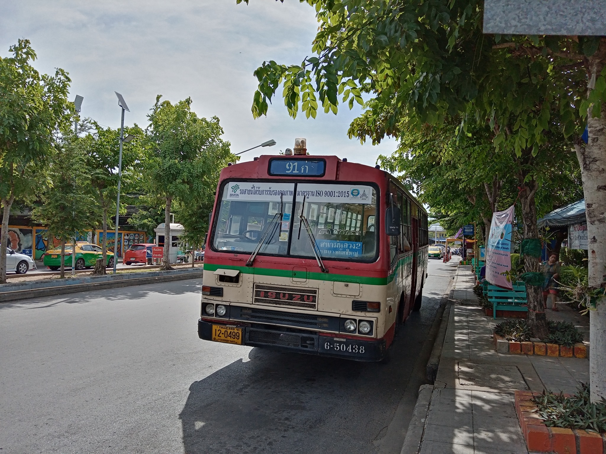 รถเมล์สาย 91ก เป็นรถเมล์เพียงสายเดียวที่วิ่งเข้ามาถึงสนามหลวง 2